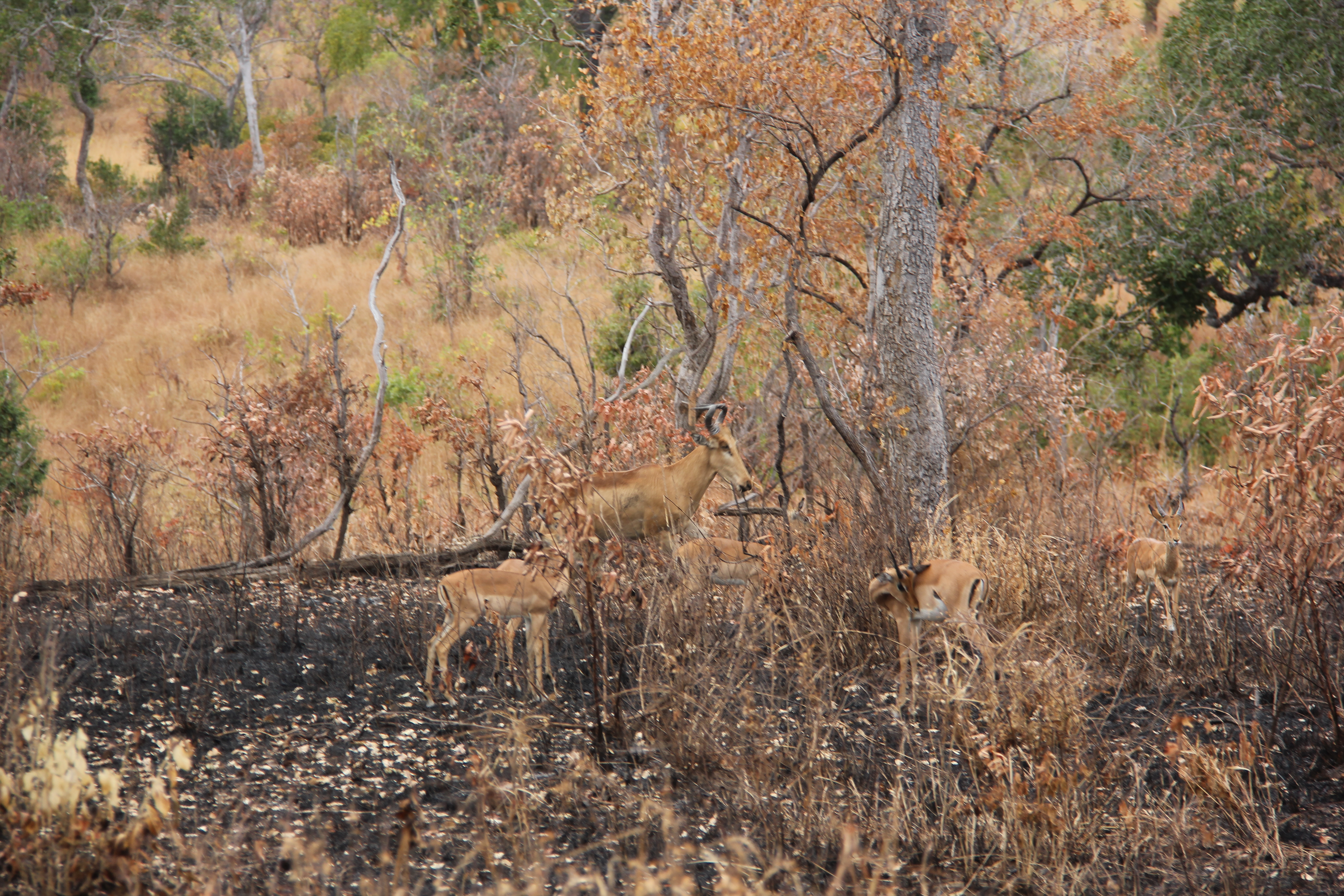 Selous